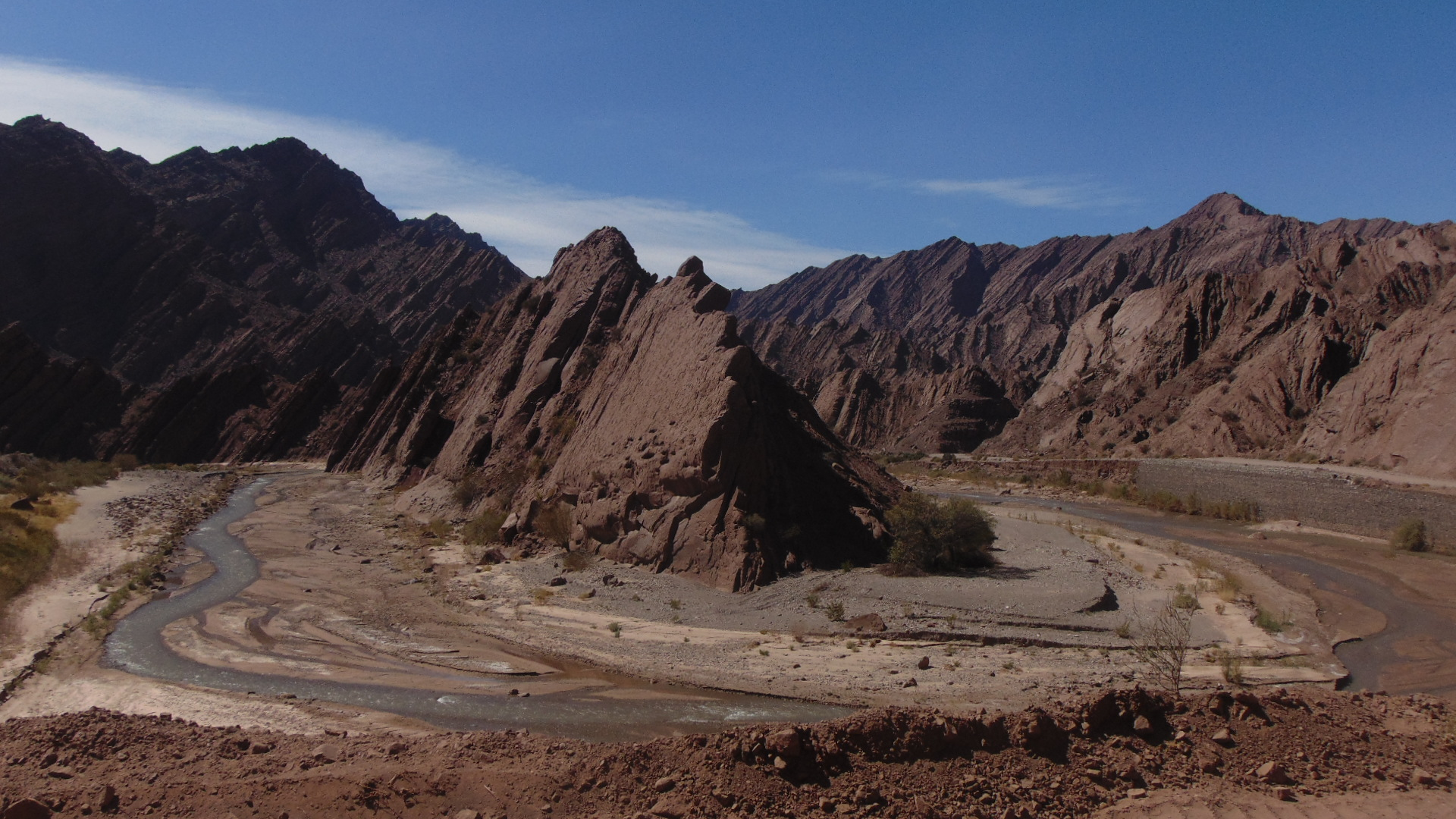 Nace en las vertientes de Jagüé , es un río manso en invierno, pero bravío en verano, atraviesa la quebrada La Troya hasta llegar al Valle del Bermejo en toda su extensión, va tomando diferentes nombres de acuerdo a los pueblos que atraviesa en su recorrido; río Jagüé , rio La Troya, río Bermejo. Significa vida porque sus aguas sirvieron al pueblo Capayán para su cultivo y sustento de vida, extinguida esta raza, es vida para los pobladores de Vinchina porque su caudal canalizado les permite cultivar la tierra, convirtiendo sus potreros en trigales, alfalfares, maizales y viñedos.